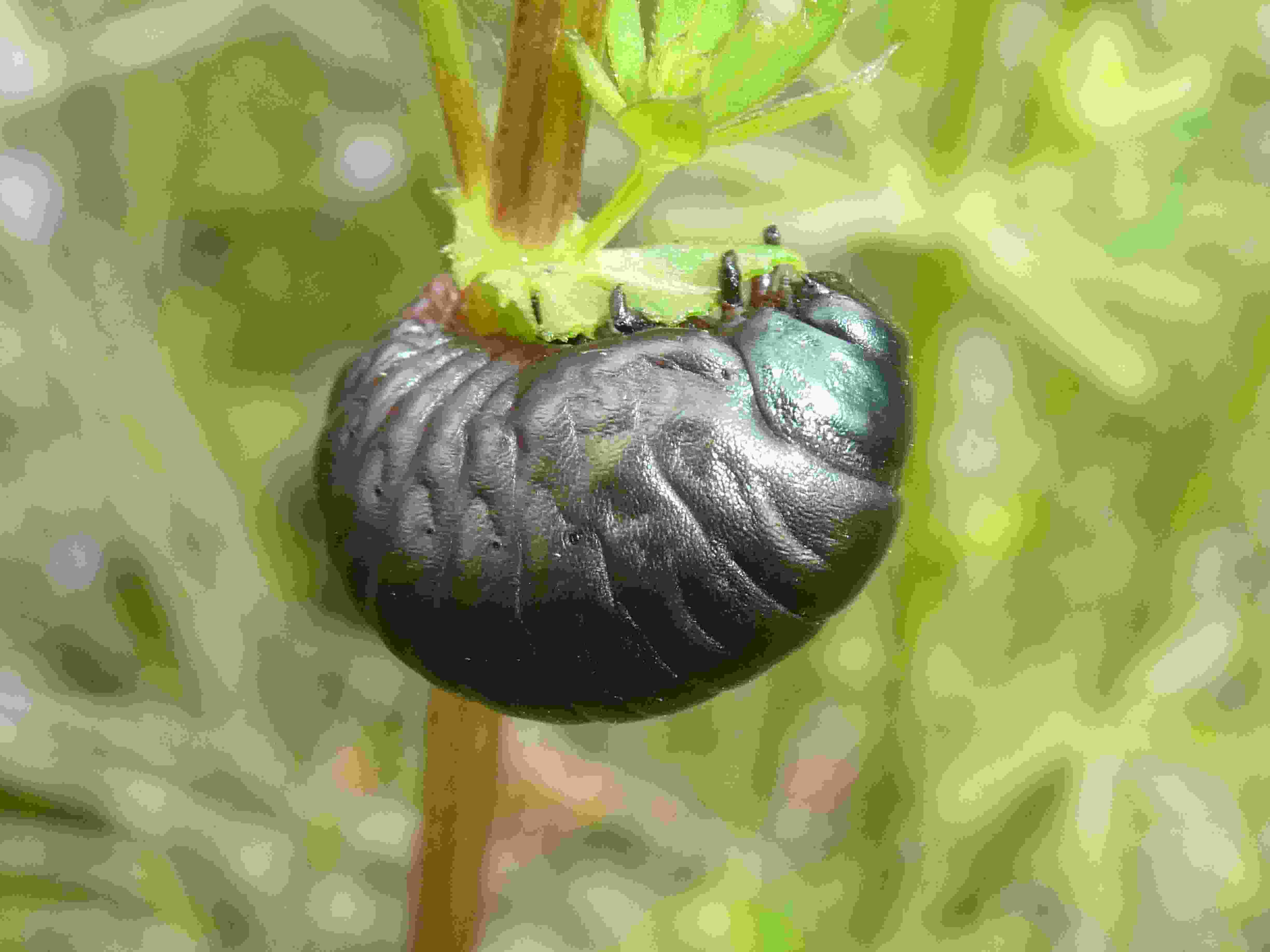 Larve des Tatzenkäfers (Timarcha tenebricosa), fast erwachsen; frisst an Labkraut